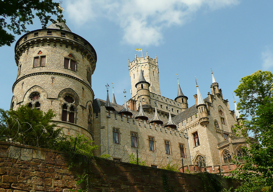 Schloss Marienburg